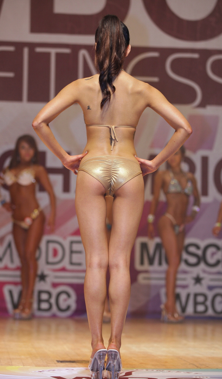 에스제이 콘텐츠 매거진 2016 WBC 피트니스 오픈 월드 챔피언쉽 모델여자종목 3라운드 비키니웨어